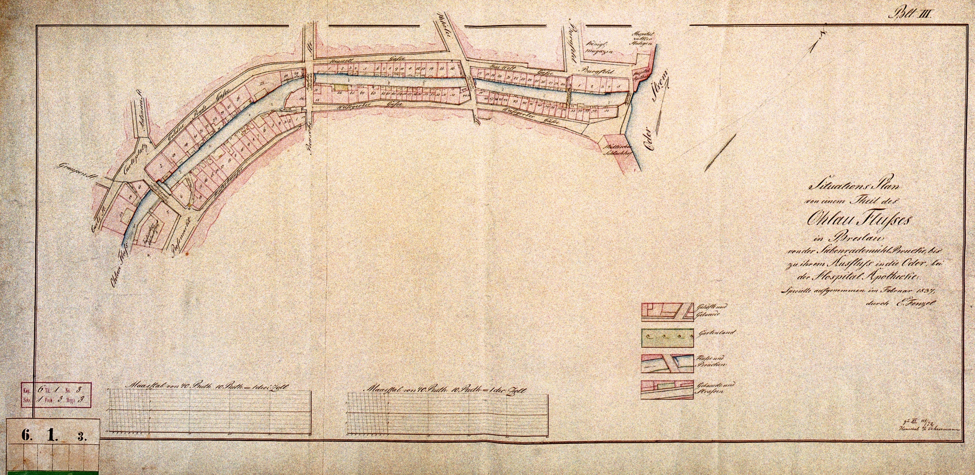 Jedna z map centrum Wrocławia z 1837, przedstawiająca odcinek Oławy miejskiej pomiędzy ul. Szajnochy (Rossmarkt na mapie) i placem Boh. Getta (Carlsplatz) - na południowym zachodzie, z lewej strony mapy, a ujściem do Odry (Oder Strom) na północnym wschodzie (po prawej) Mosty (od lewej): • Siebenradebrücke (Most Siedmiu Kół, dziś rejon pl. Boh. Getta) • Reuschebrücke (Most Ruski, dziś rejon skrzyżowania ul. Ruskiej i Kazimierza Wielkiego) • Nikolaibrücke (Most św. Mikołaja, dziś rejon skrzyżowania ul. św. Mikołaja i Kazimierza Wielkiego) • Weißgerbersteg (Kładka Białoskórnicza, dziś rejon skrzyżowania ul. Cieszyńskiego i ul. Nowy Świat) • Hospitalbrücke albo Allenheiligenbrücke (Most Szpitalny, zwany też Mostem Wszystkich Świętych, tuż przy ujściu do Odry)